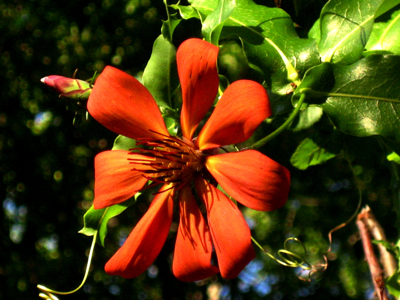 Mutisia species. Inapiren, ñuble — Region del Bío-Bío, Chile. Familia: Asteraceae